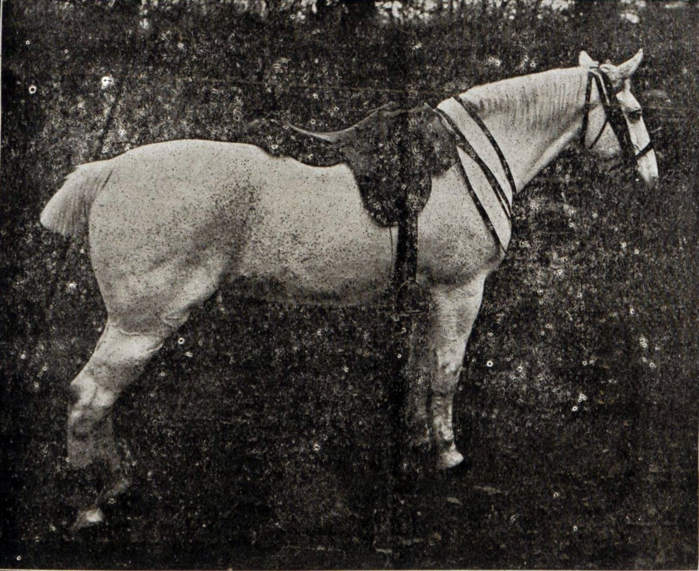 Miss Castel, par Corlay. Cette fille du célèbre étalon fut, malgré son volume, une jument de chasse hors ligne, et portait allègrement son cavalier pesant 110 kg.